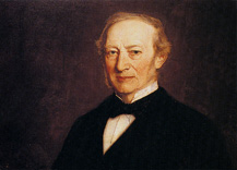 detail